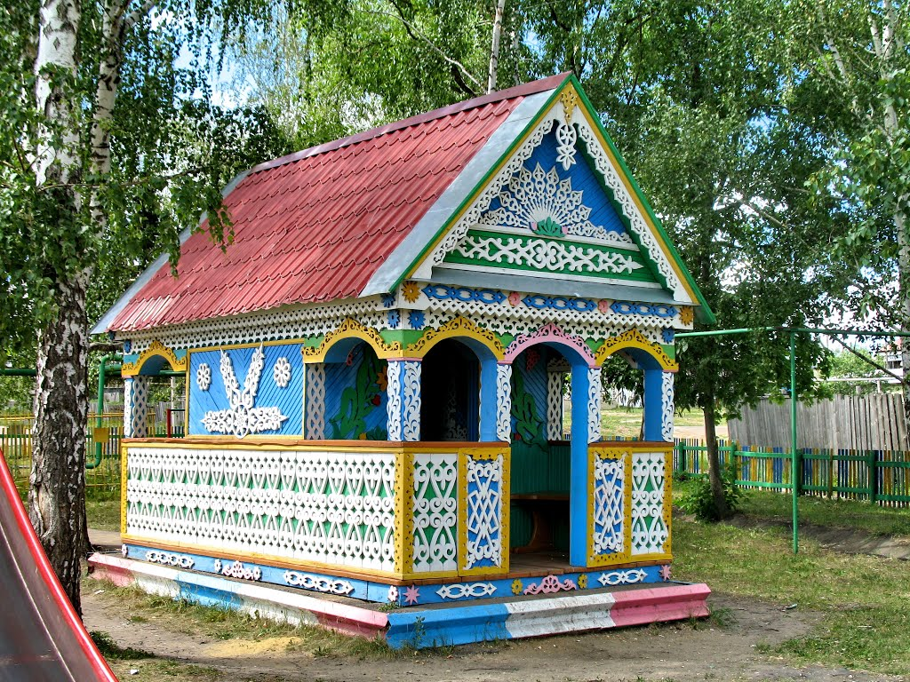 сквер